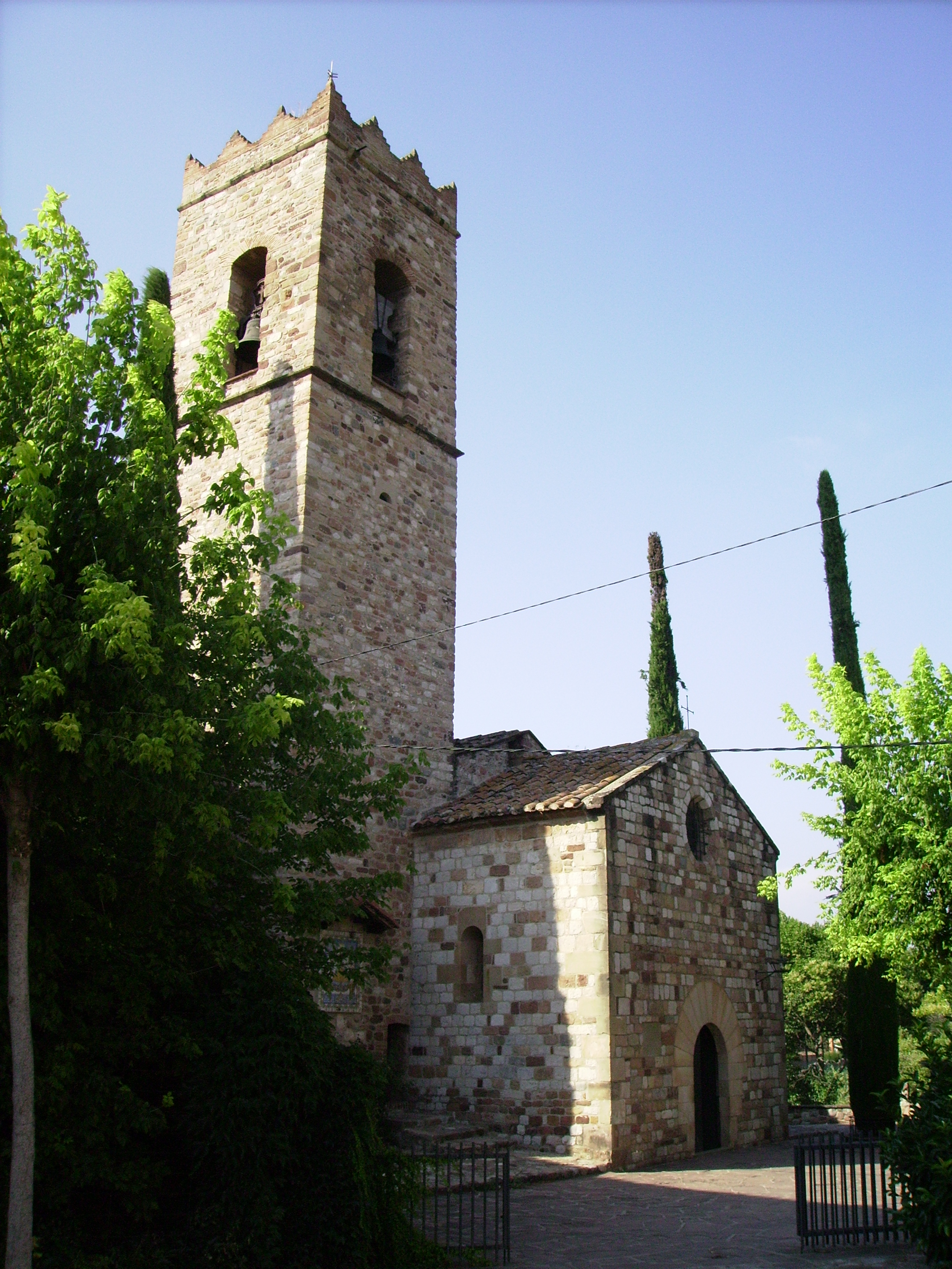 Església Romànica de més de Mil anys